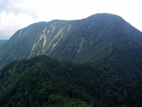 栃木県と群馬県の間にある山。皇海山。